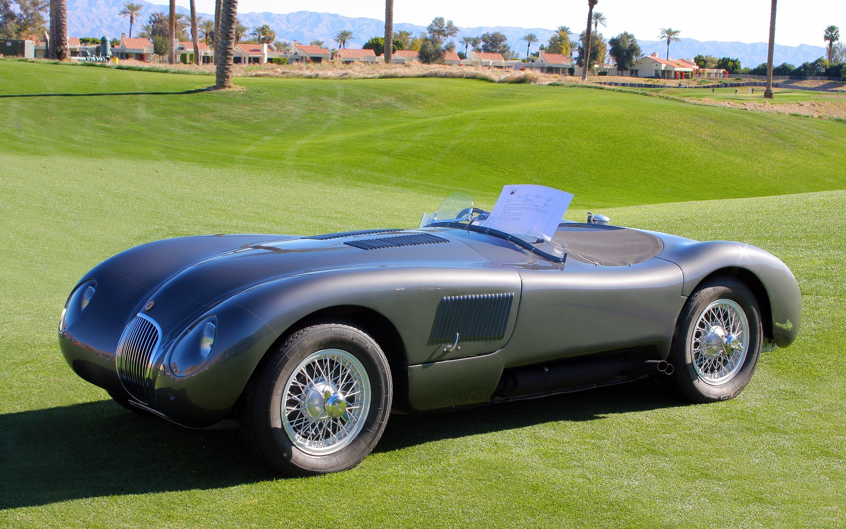 2011 Desert Classic, La Quinta, CA